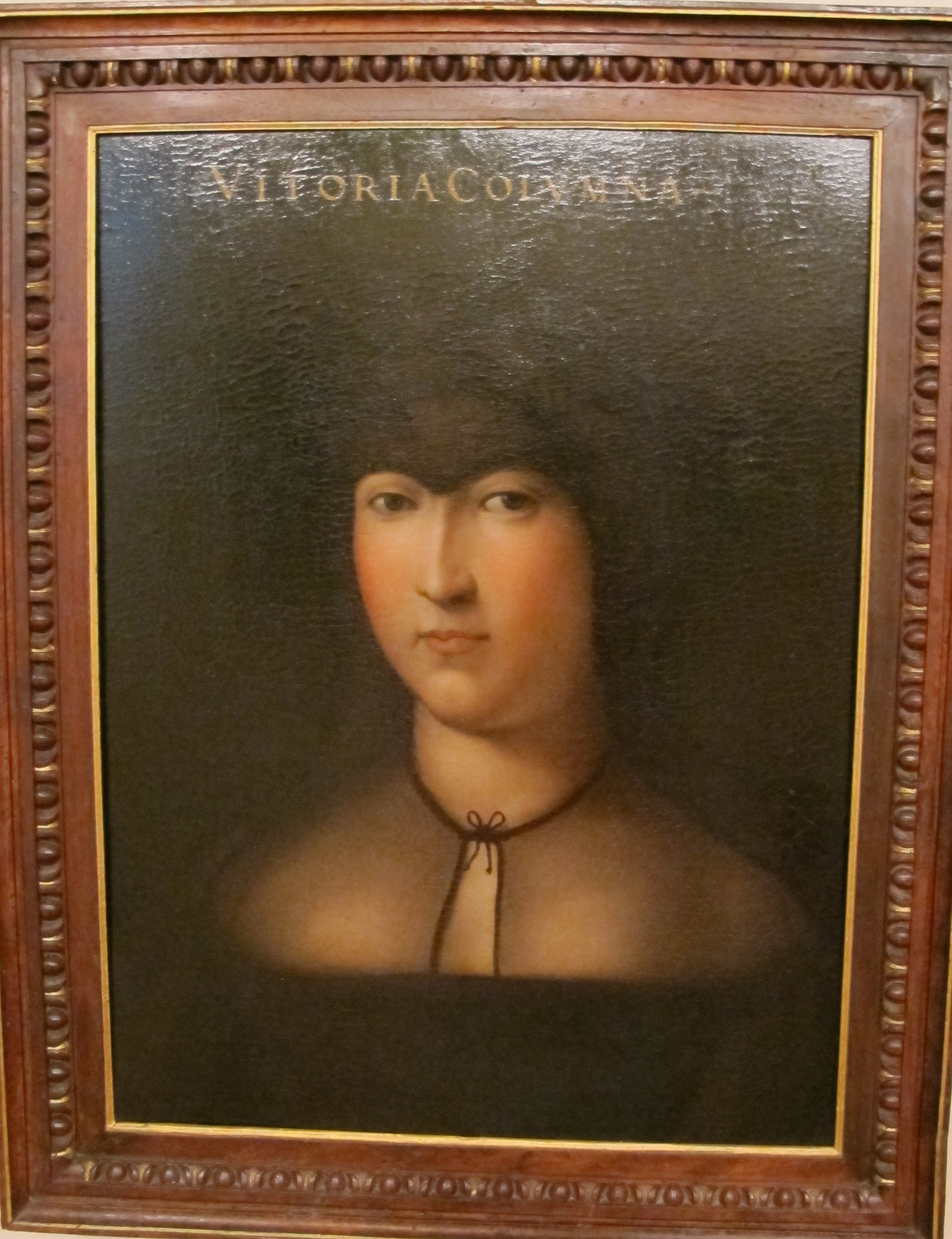 Cristofano dell'altissimo, vittoria colonna, ante 1568